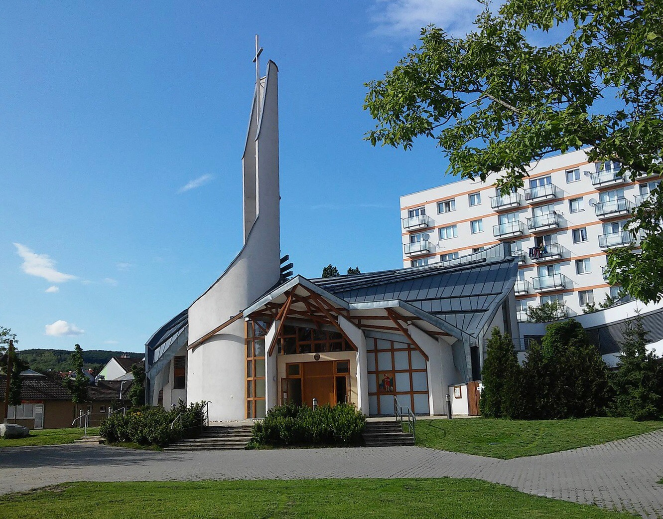 Katedrála svätého Šebastiána, Bratislava - Rača